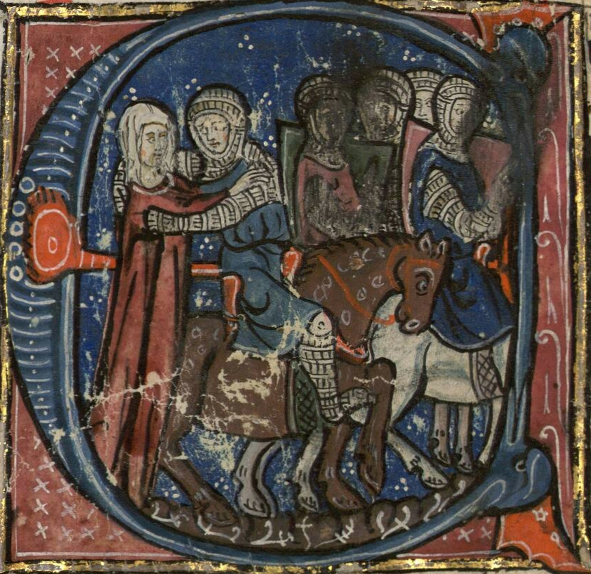 Sainte Ide disant adieu à ses fils